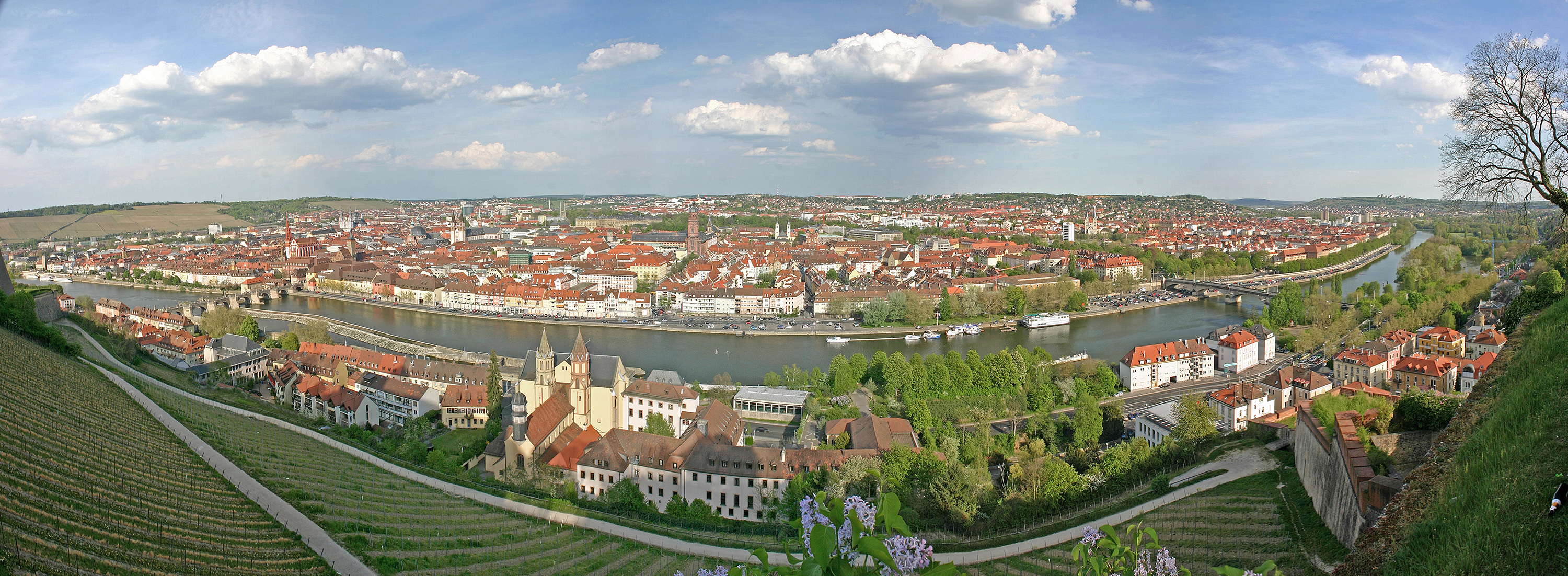 Blick in die Würzburger Altstadt von der Festung Marienberg aus